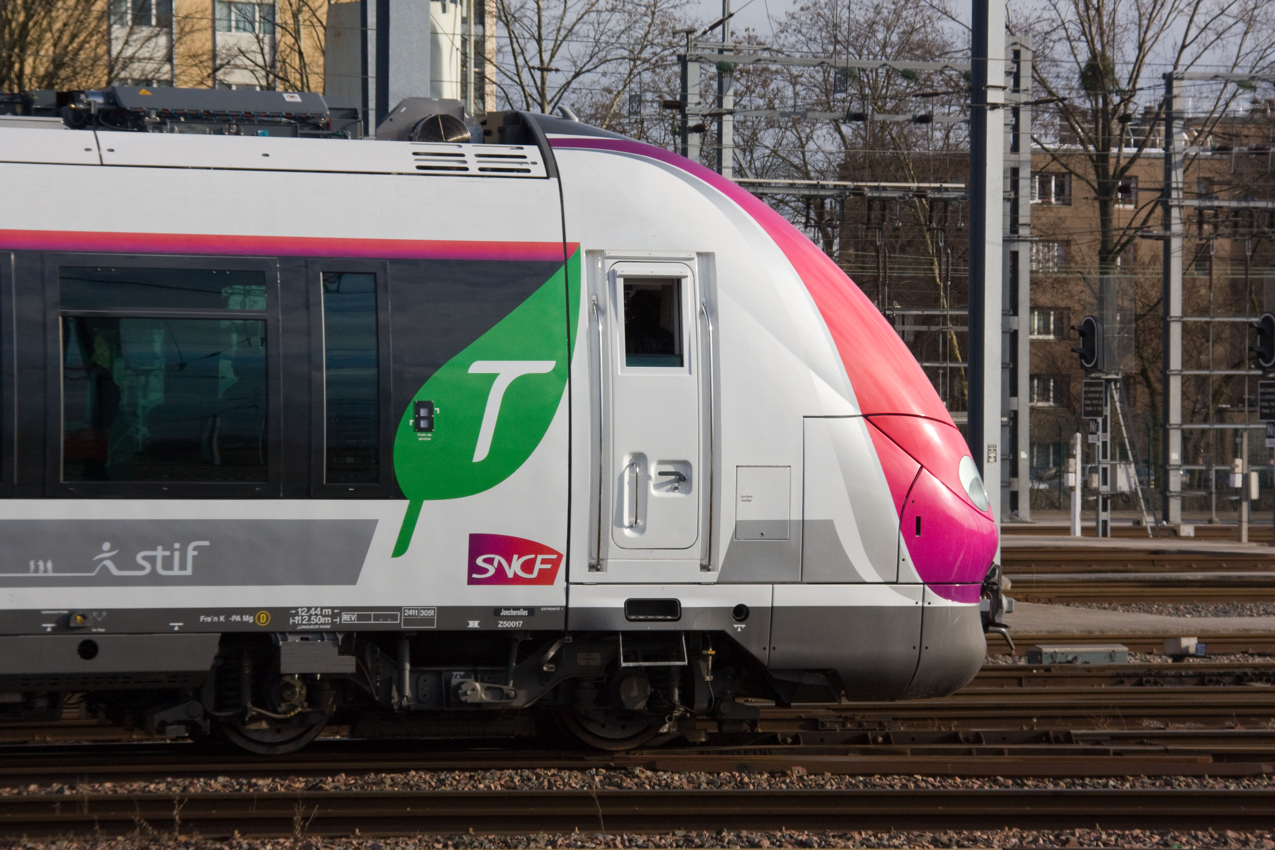 Journée Porte Ouverte du 20 mars 2010 au technicentre Paris Nord-Joncherolles, Villetaneuse, Seine-St-Denis, France